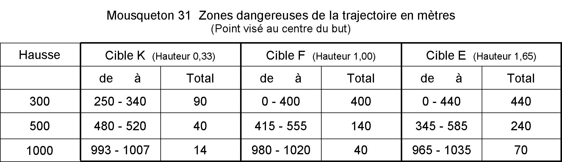 Mousqueton 31 Zones dangereuses de la trajectoire